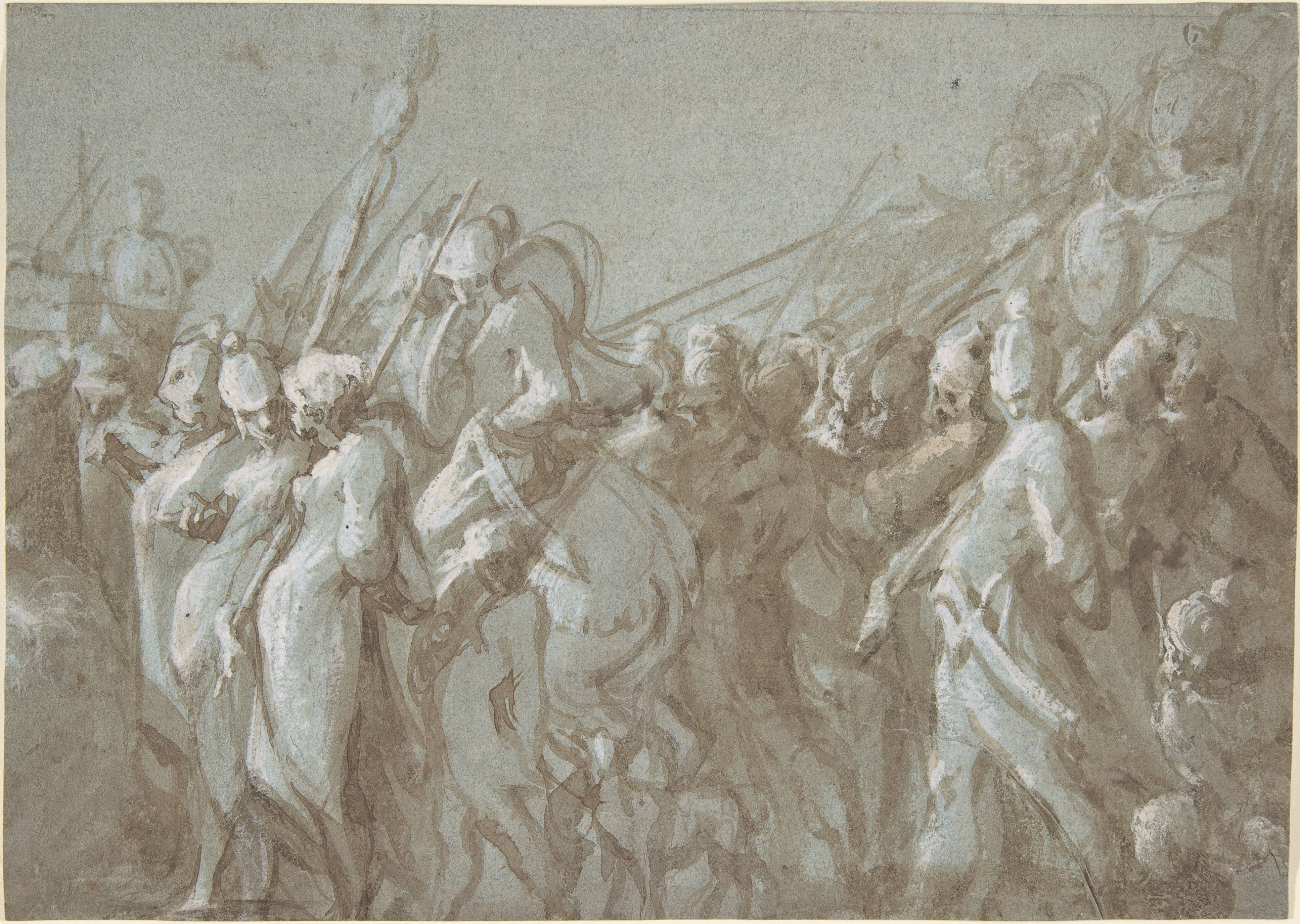 Drawing; Drawings